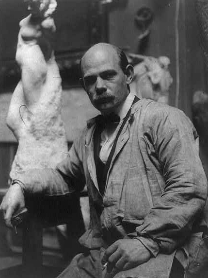 American sculptor Gutzon Borglum (1867-1941)